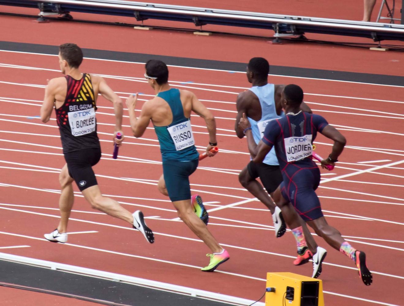 d8_10 4x400m reeksen mannen